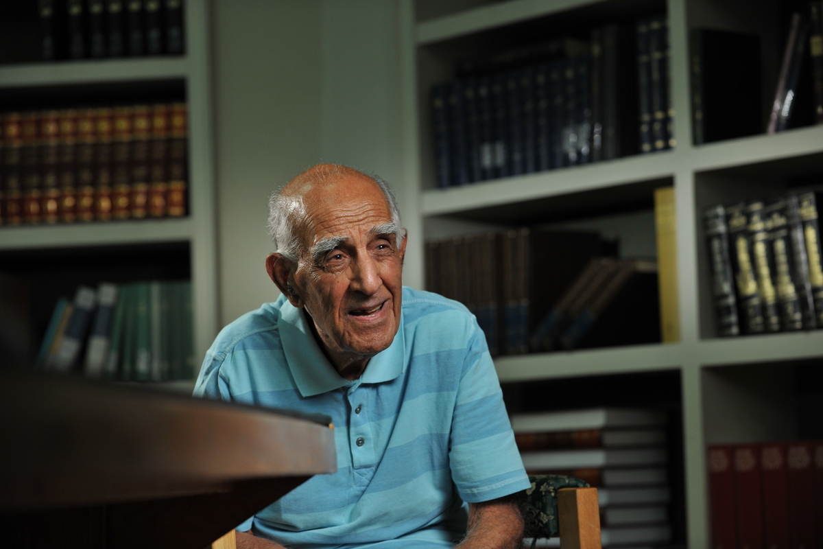 احمد اقتداری - پاسبان خلیج فارس